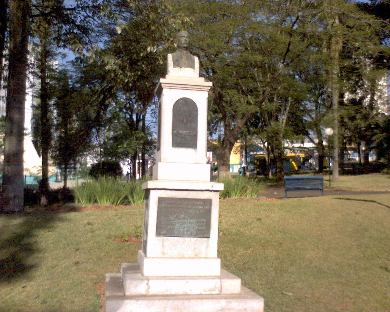 Busto em homenagem ao empresário Comendador Müller